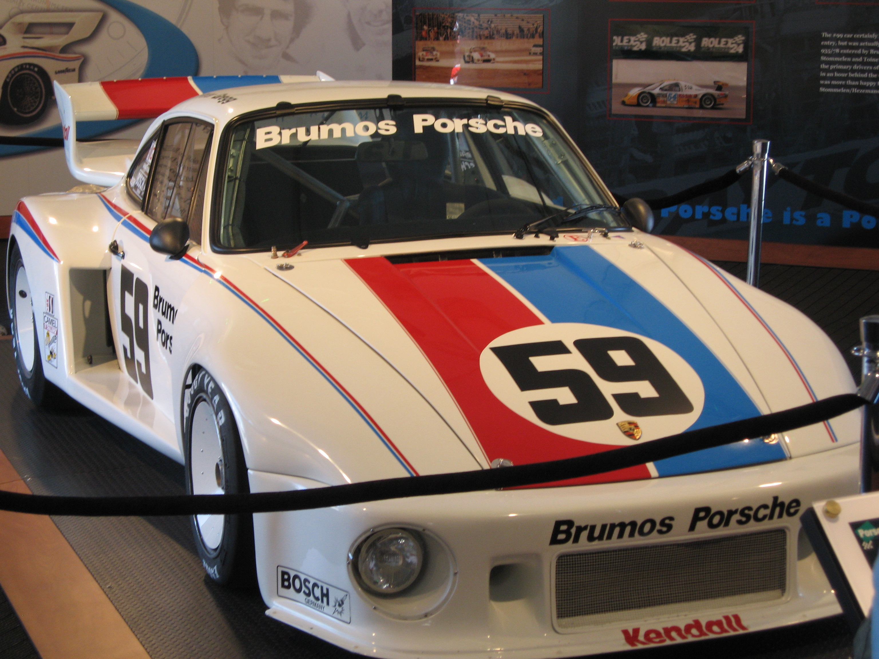 Brumos Porsche 935 #59.IMG_3533